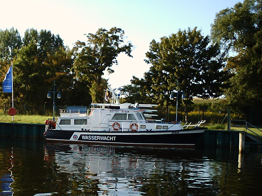 Motorrettungsboot der DRK-Wasserwacht Name des Bootes: Atair Heimathafen: Greifswald, Mecklenburg-Vorpommern Eigner: Deutsches Rotes Kreuz Kreisverband Ostvorpommern e.V. mit Sitz in 17389 Anklam